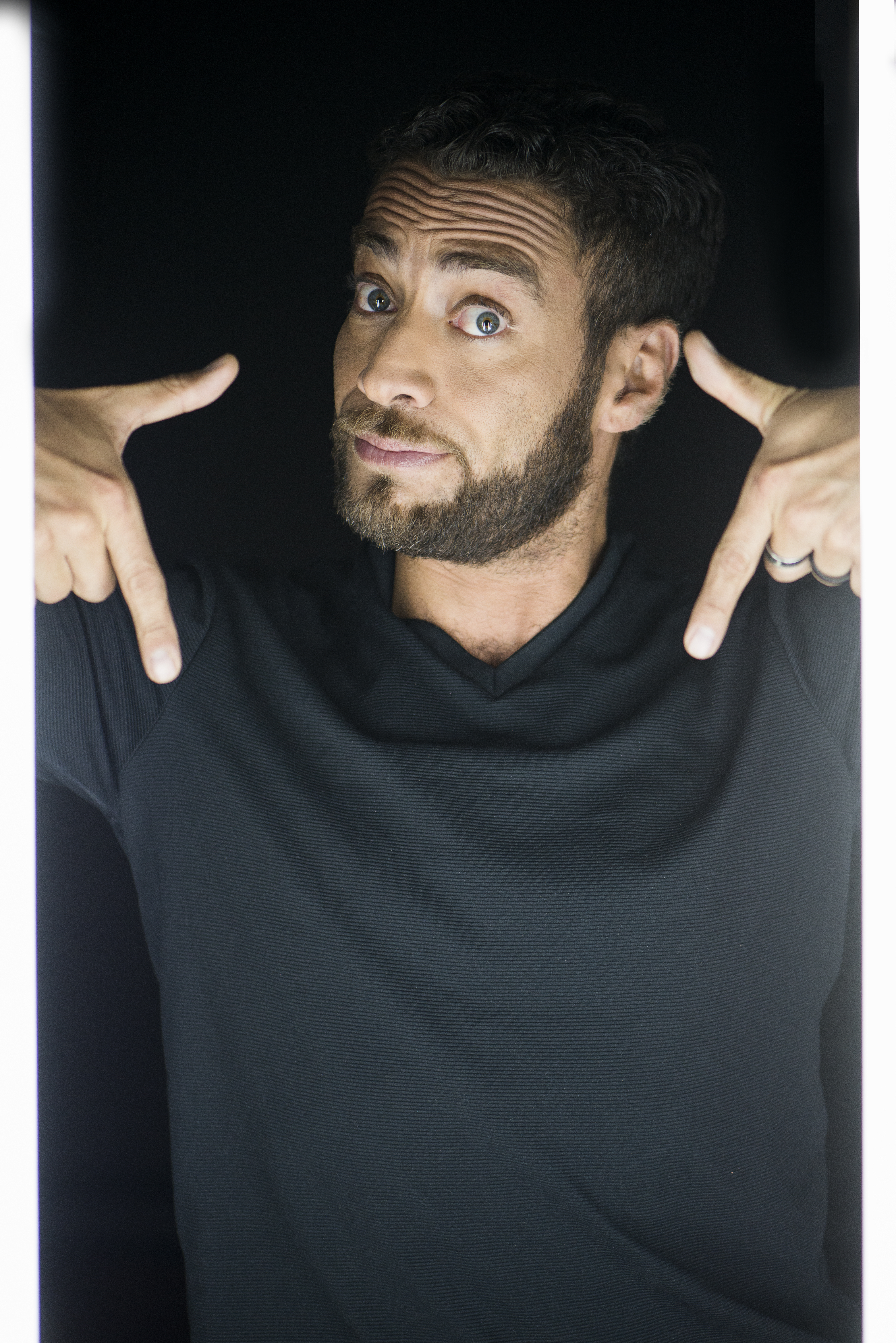 Danilo Esteves en 2015.